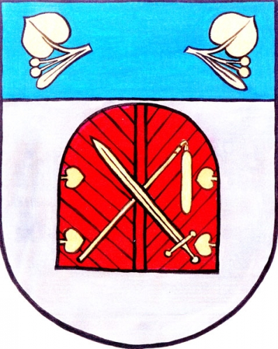 znak, Libel, okres Rychnov nad Kněžnou